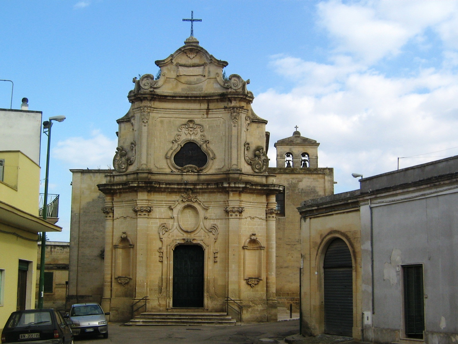 Chiesa di San Vito Castri di Lecce